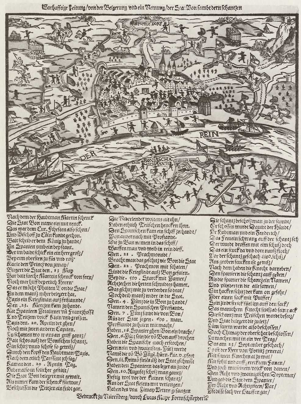 Holzschnitt von Lucas Meyer von der Belagerung von Bonn im Jahr 1588. Das Original befindet sich heute im British Museum